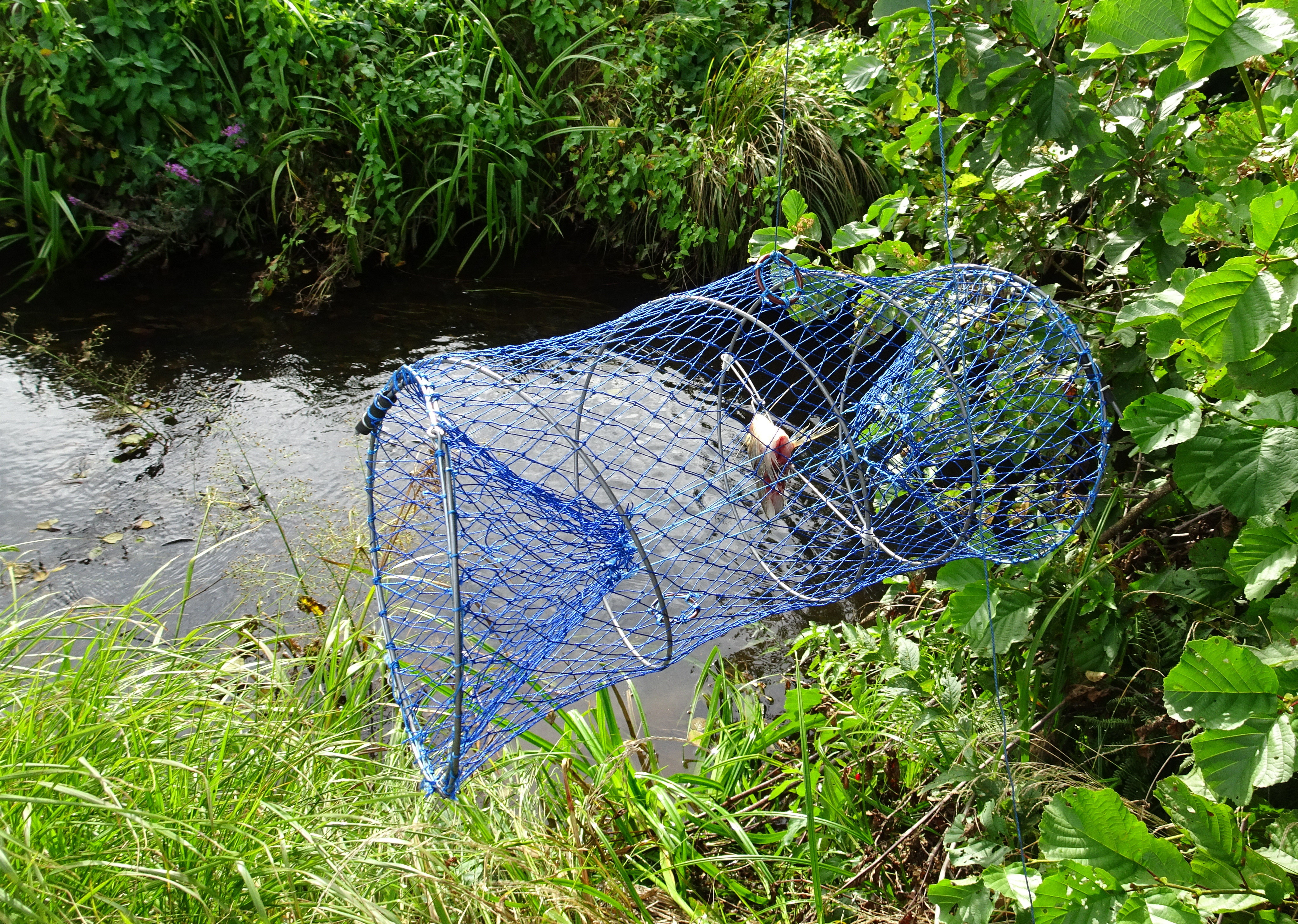 Kräftmjärde med bete